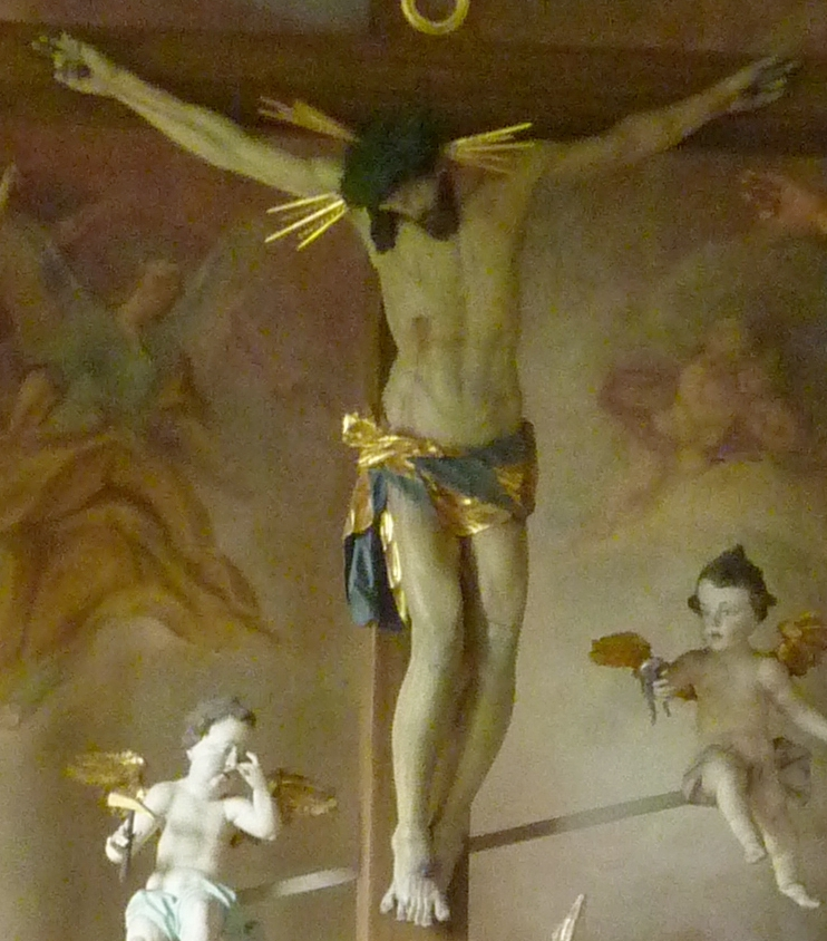 Ausschnitt aus User:GFreihalters Photo Datei:Mindelaltheim Heilig Kreuz 946.JPG